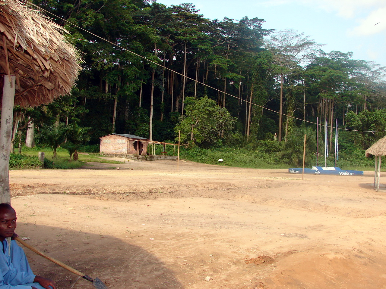 Plage_de_riève_tshopo.JPG